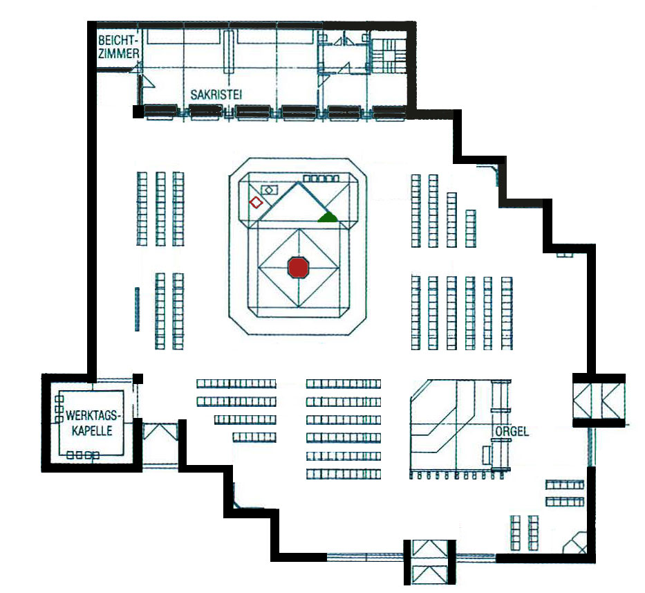 Grundrissplan Pfarrkirche St Michael, Trier-Mariahof